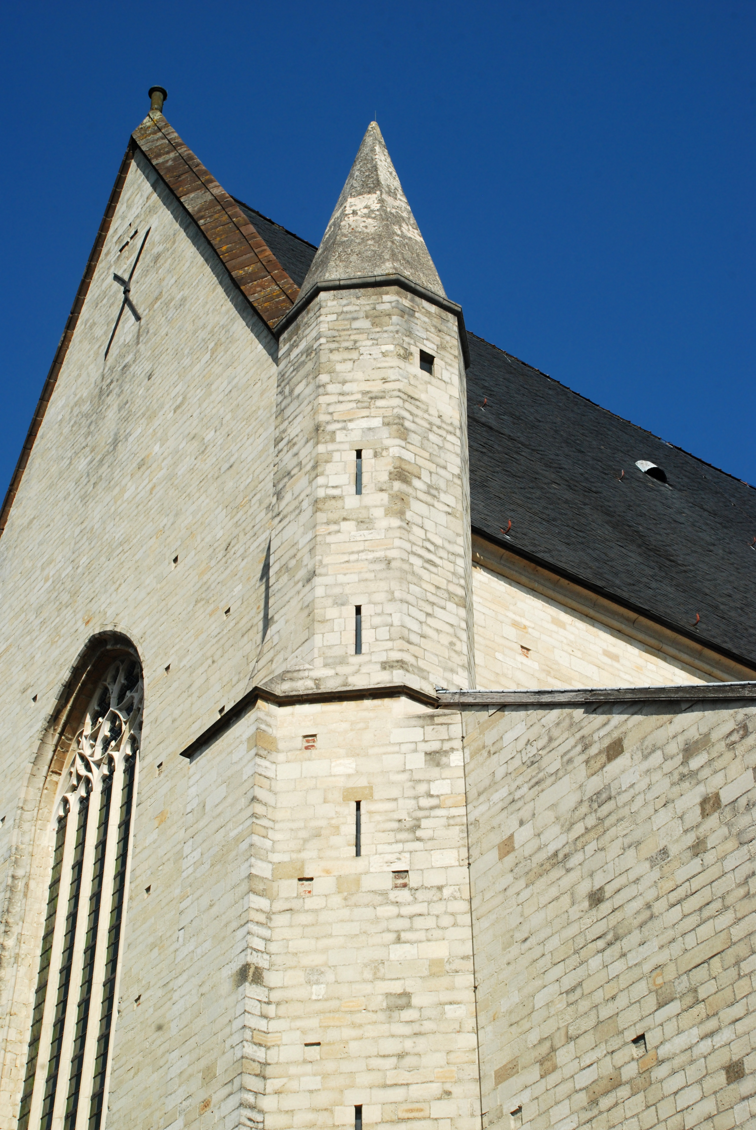 Belgique - Louvain - Église Saint-Jean-Baptiste-du-Béguinage - tourelle